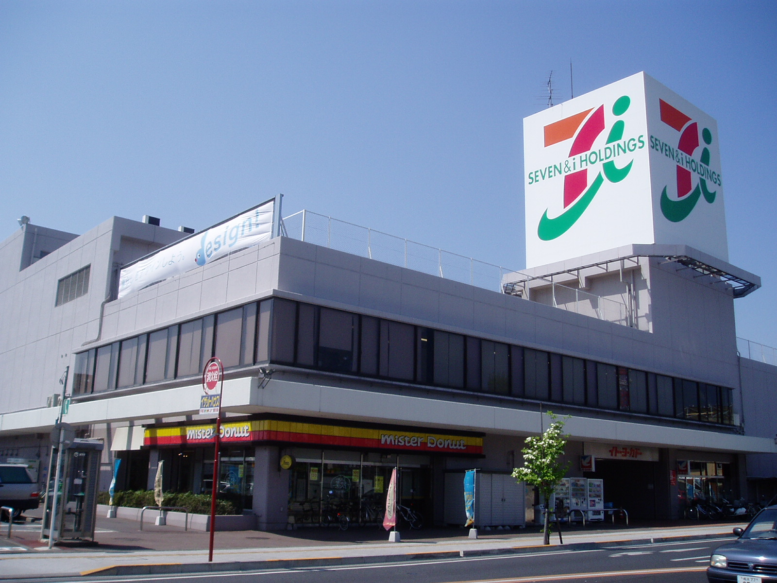 イトーヨーカドー足利店外観